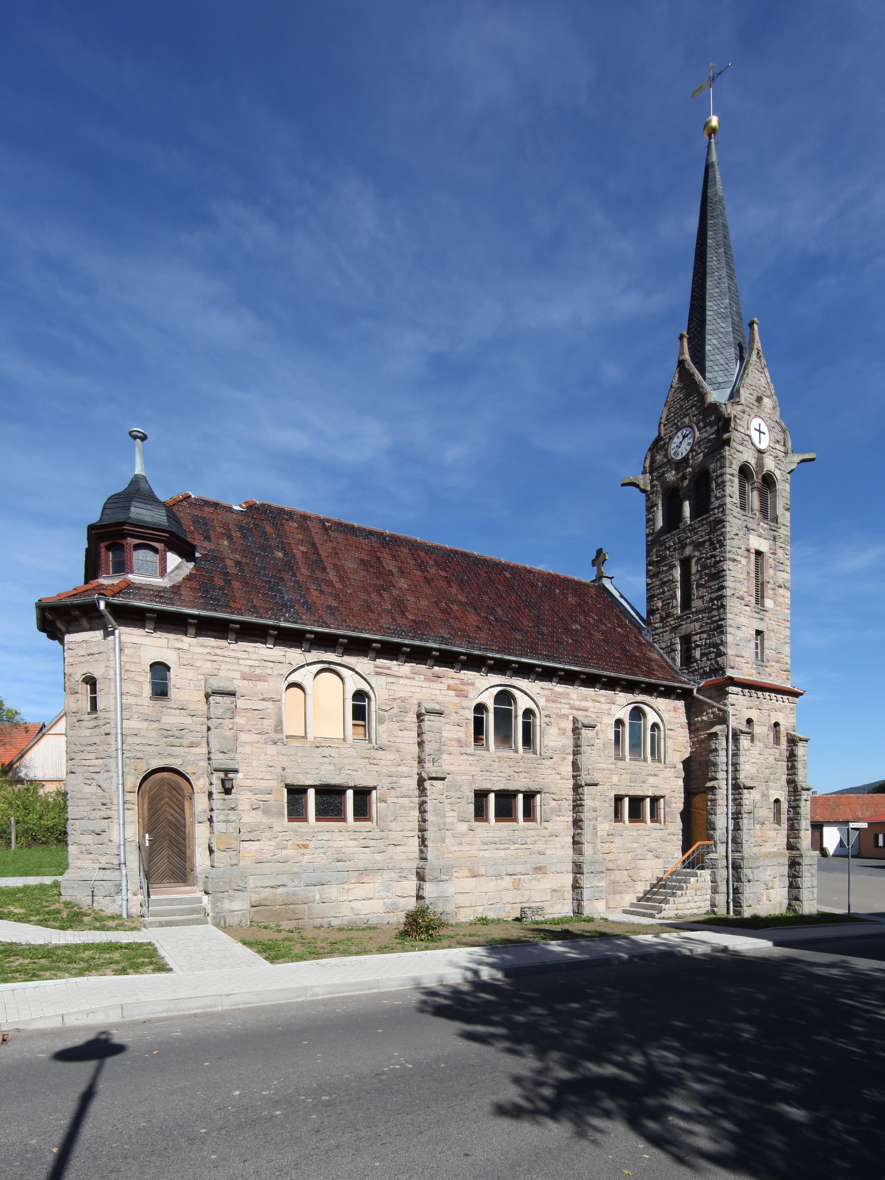 Evangelische Kirche in Schafhausen, 1902 Karl Behlert